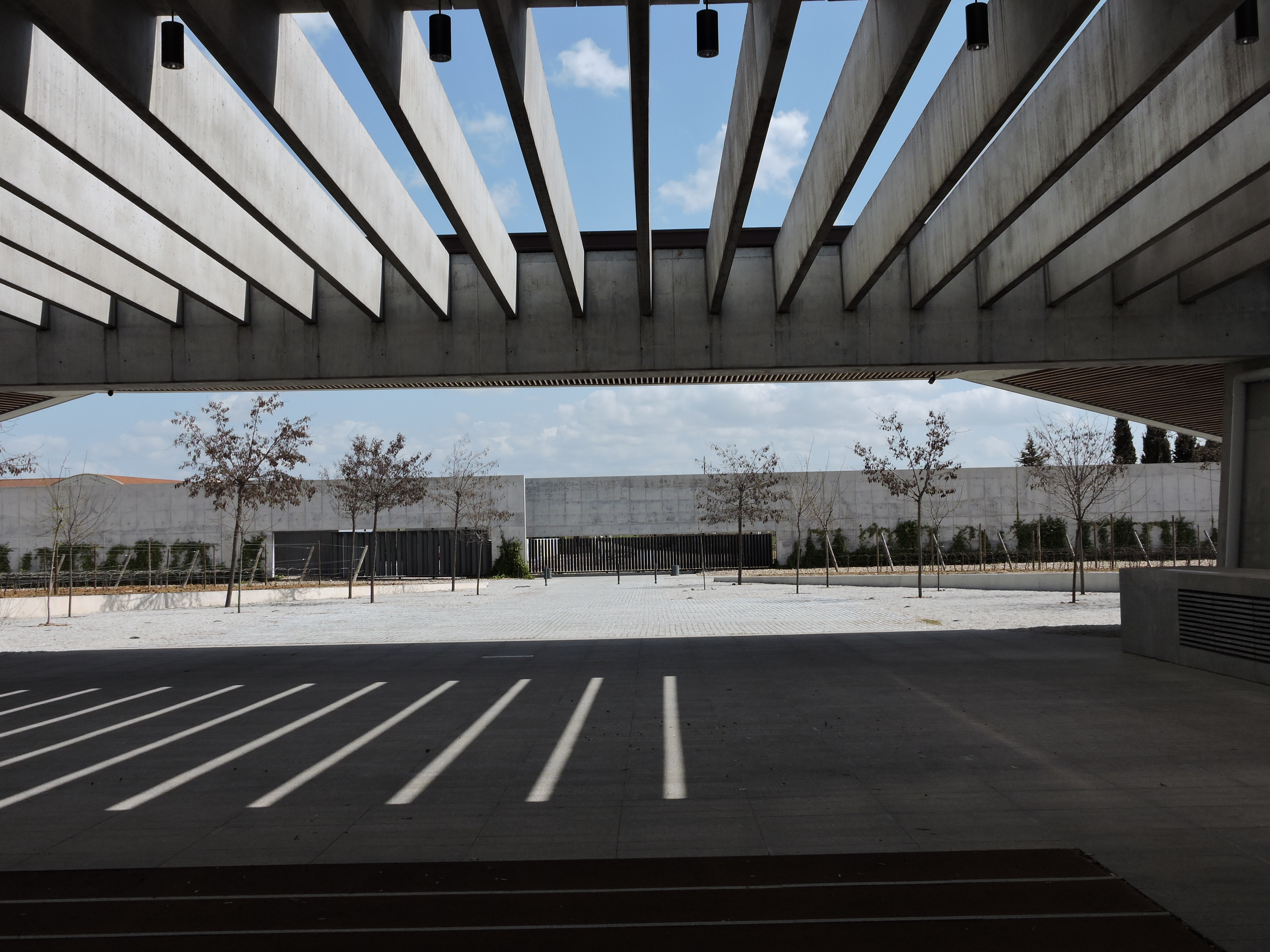 Norman Foster - Bodegas Portia (08370 Gumiel de Izán, Burgos, Spain) Bilck vom Eingangsbereich/Entree zurück